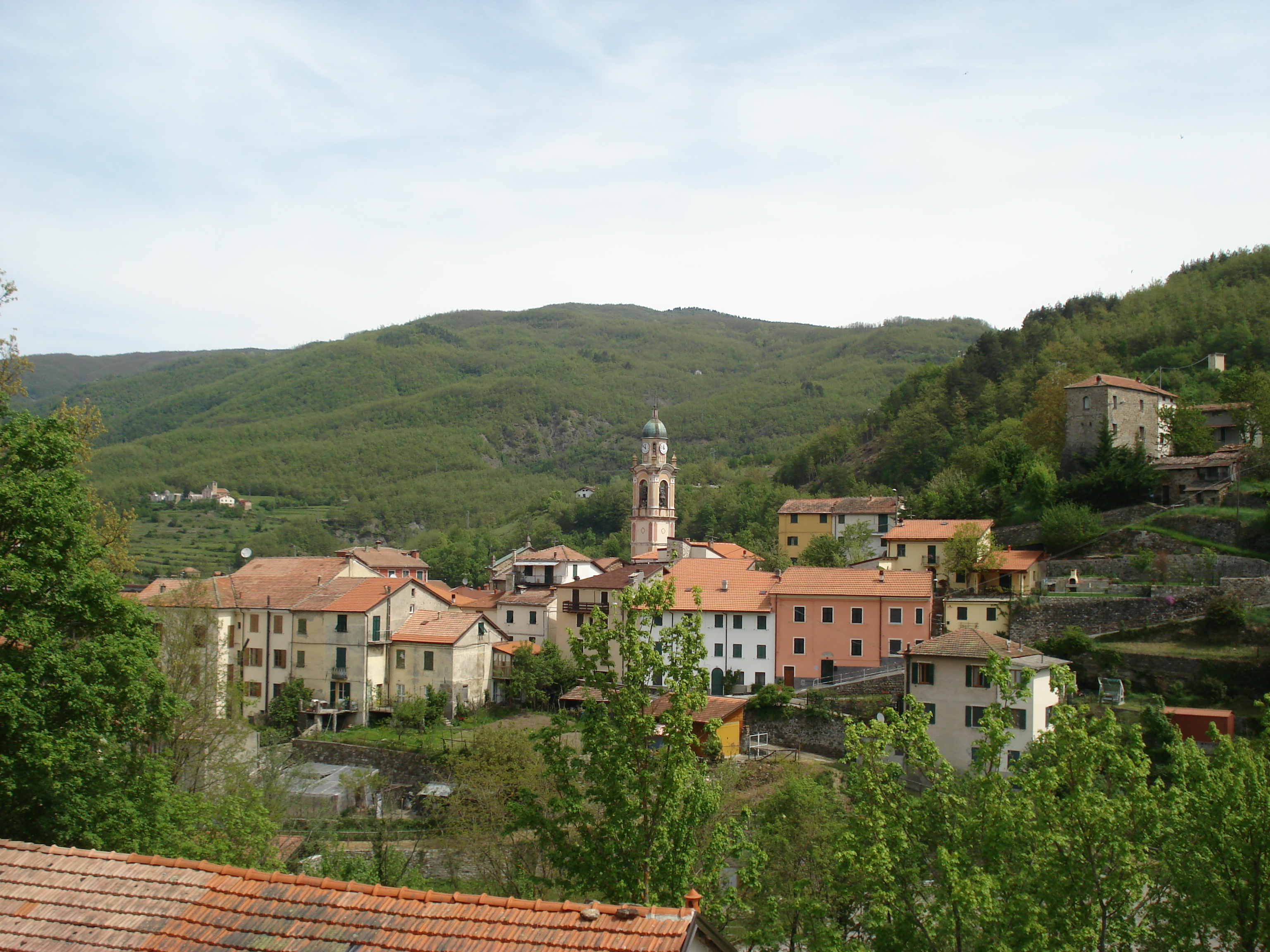 Ottone (Cosmin latan)